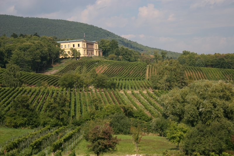 eigen werk, vrijgegeven onder GFDL